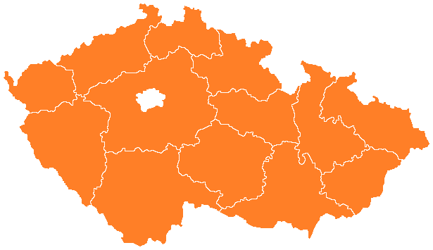 Volby do zastupitelstev krajů v roce 2008 - vítězné strany v jednotlivých krajích (oranžová ČSSD)